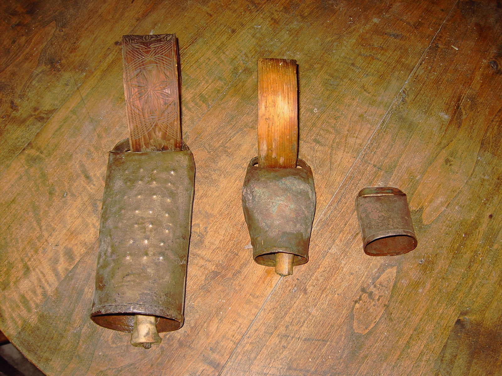 La familia de la esquilla, de izquierda a derecha Truco, esquilla y esquilleta.